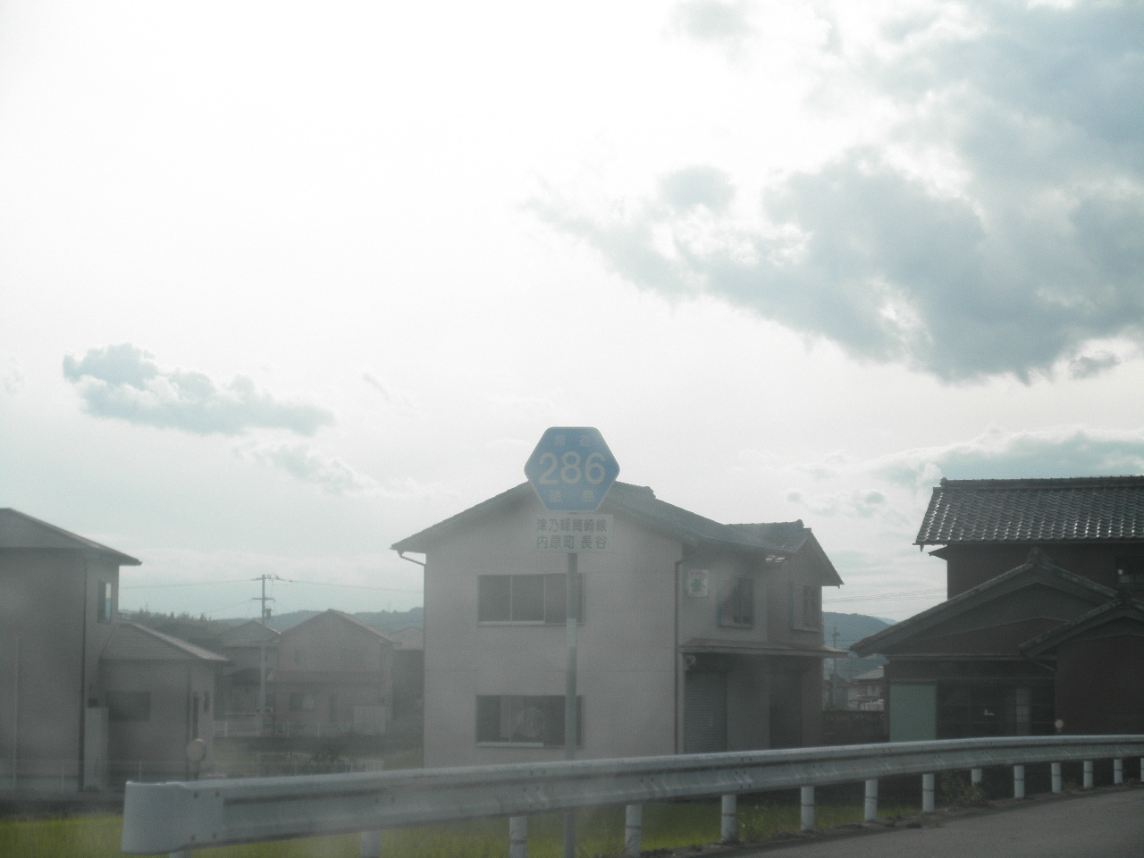 徳島県阿南市内原町長谷 徳島県道286号津乃峰筒崎線